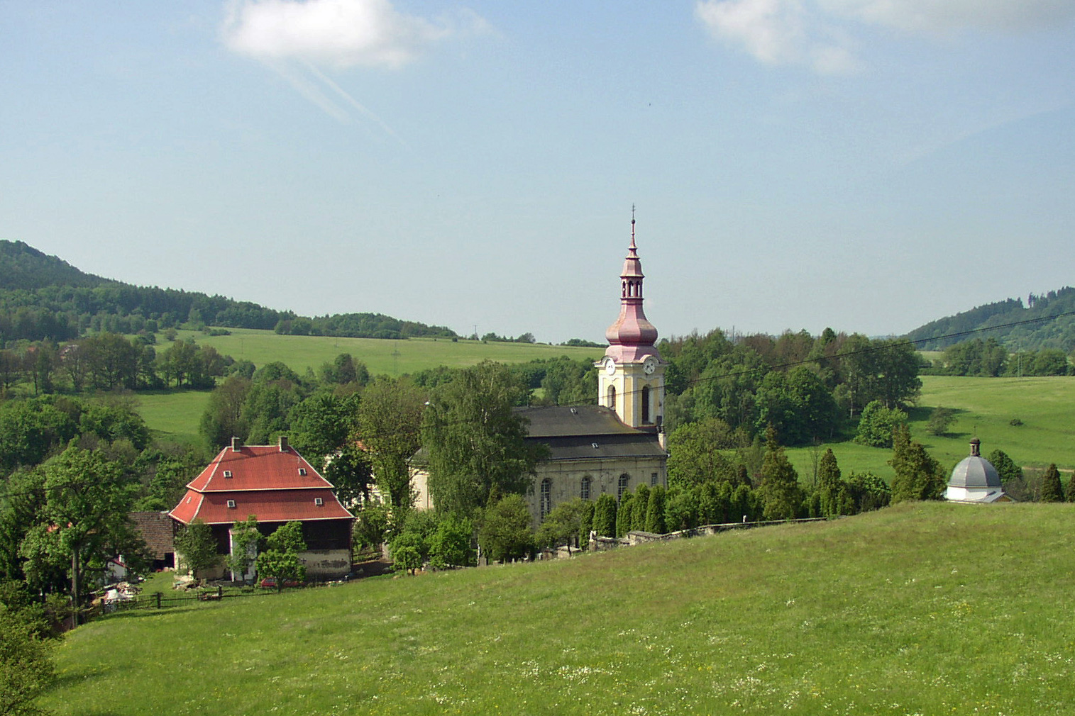 Kostel ve Volfarticích, fotografováno ze cyklostezky Varhany